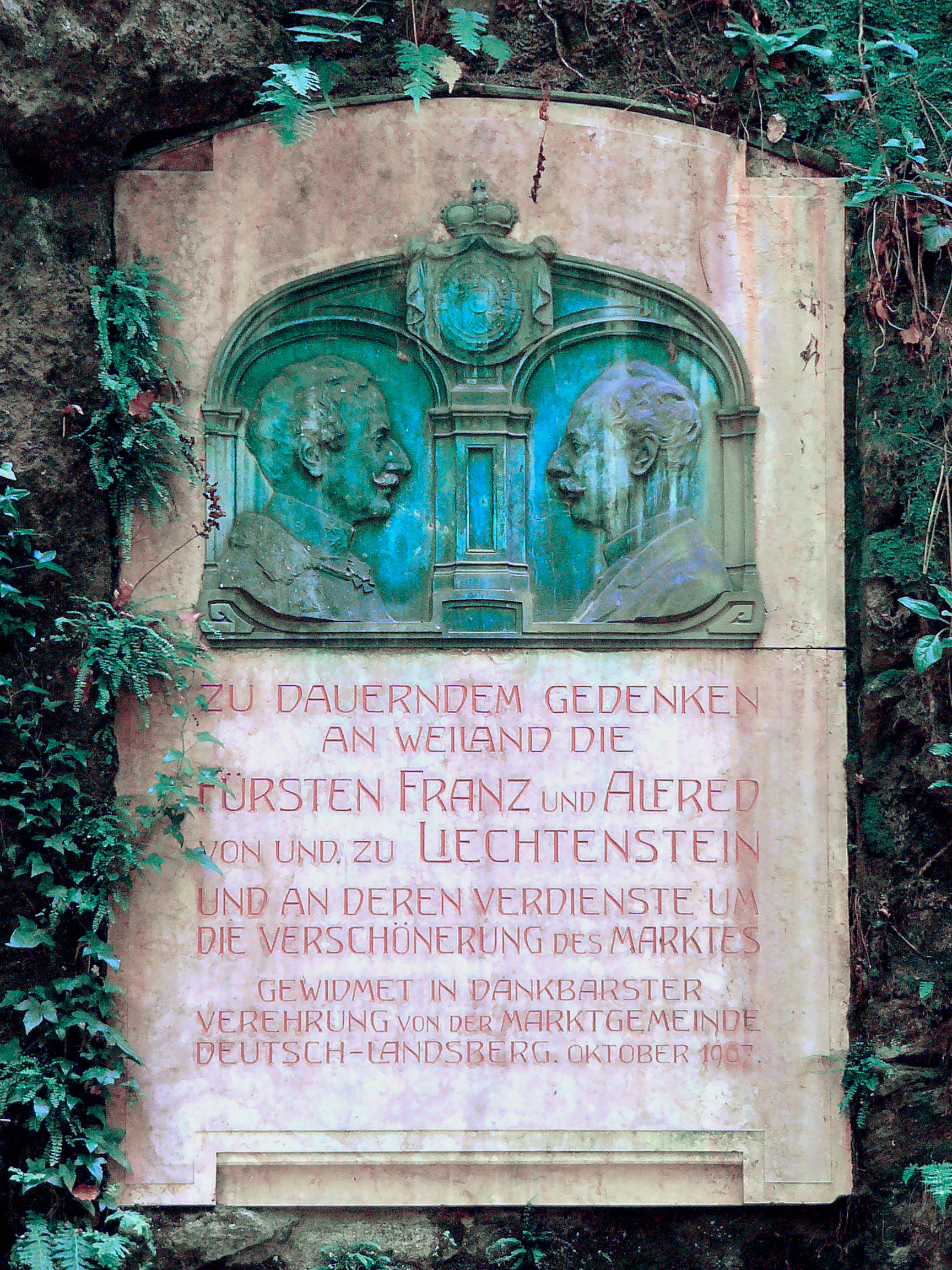 Gedenktafel in der Deutschlandsberger Laßnitzklause.